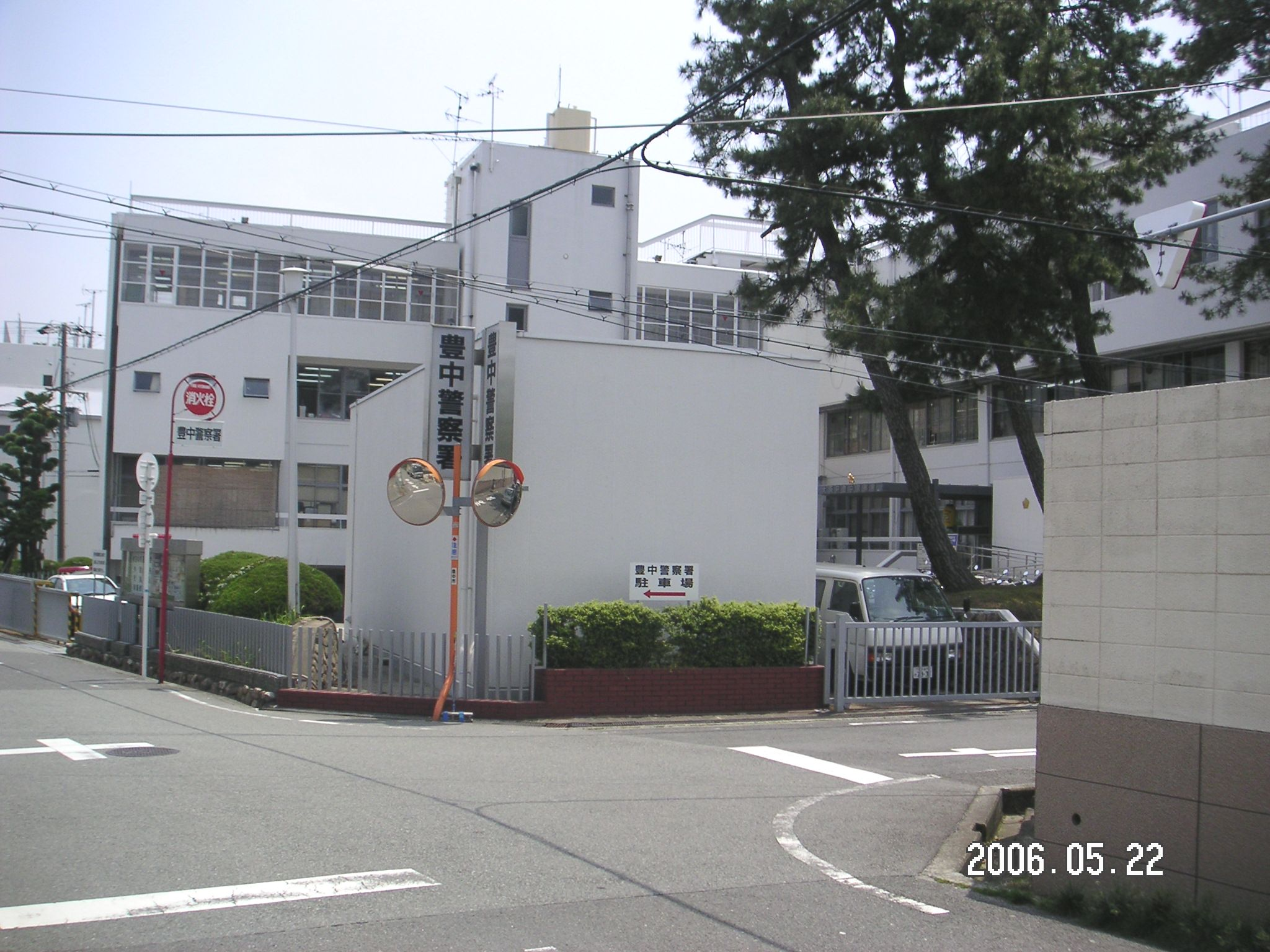 投稿者本人による撮影（2006年5月22日、豊中警察署前にて撮影）